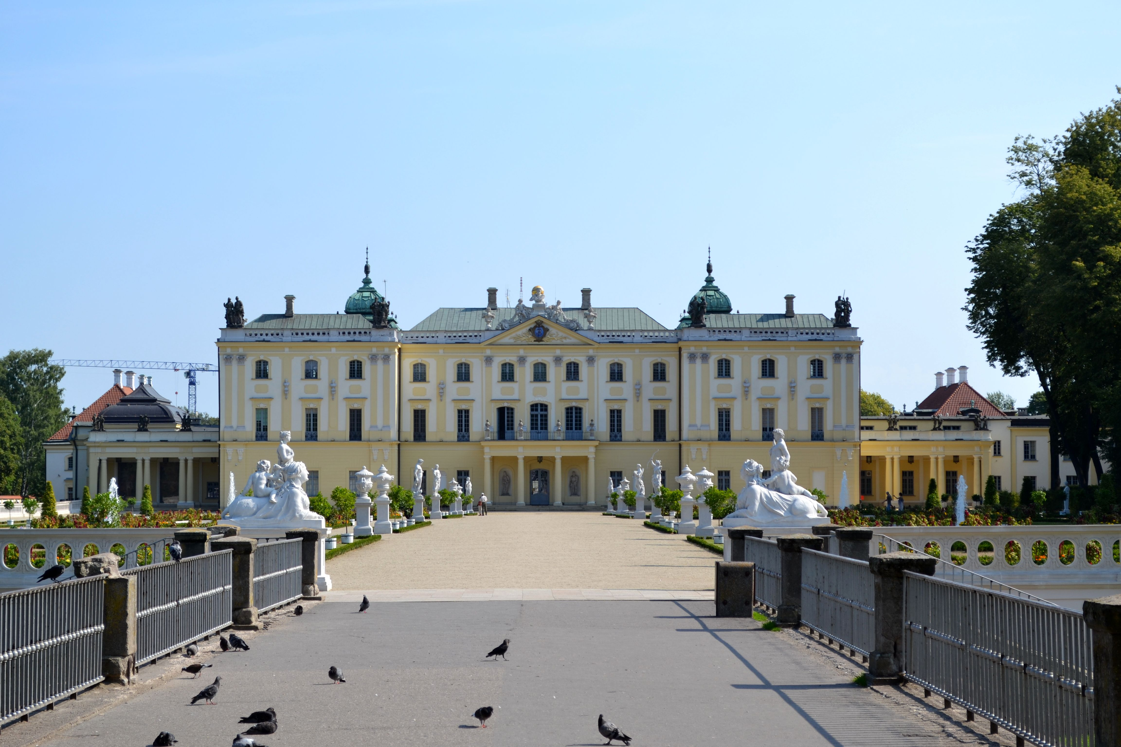 Białystok, zespół pałacowy Branickich